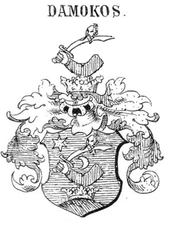 Az alsócsernatoni Damokos család cimere